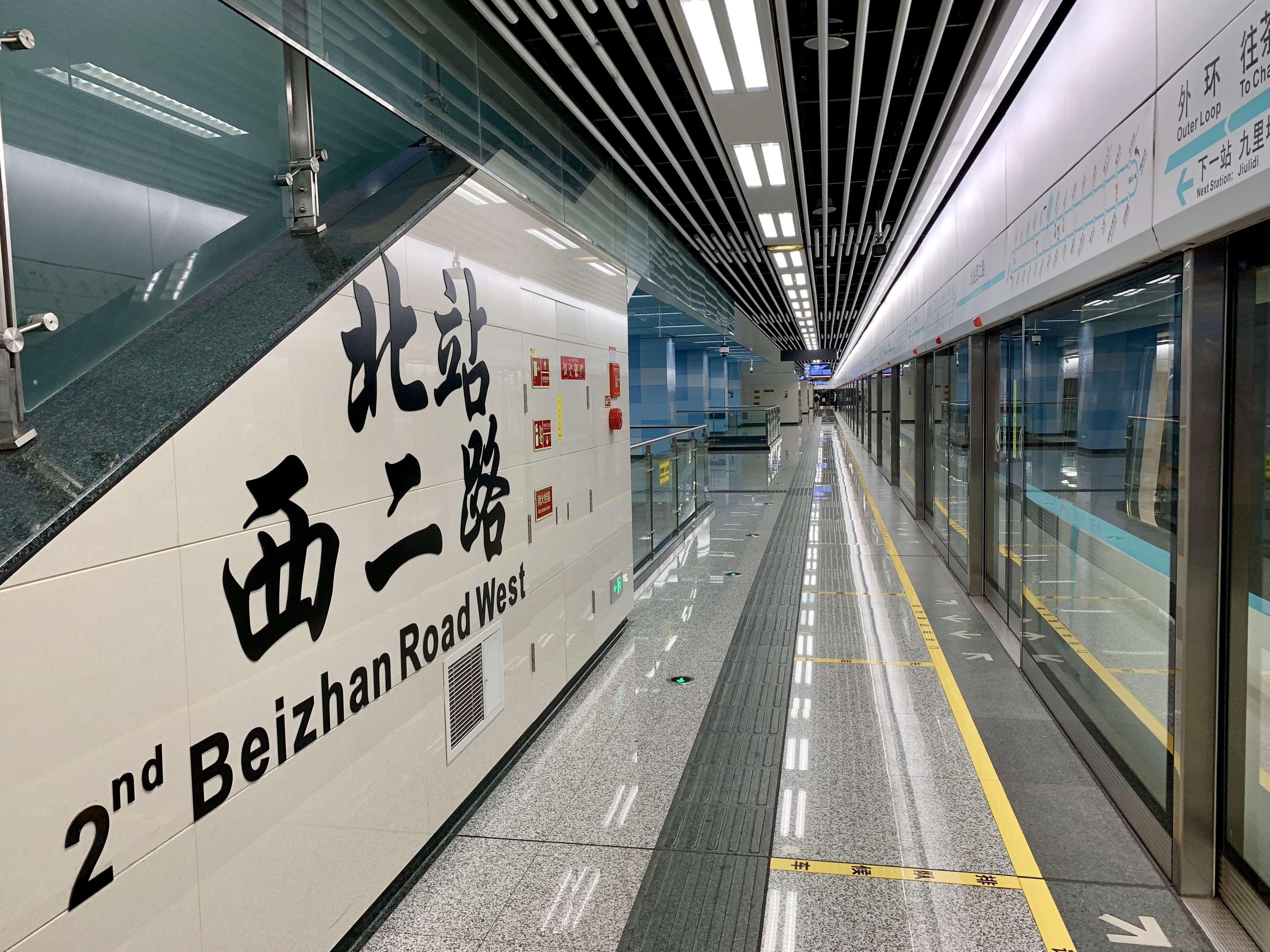 成都地铁北站西二路站